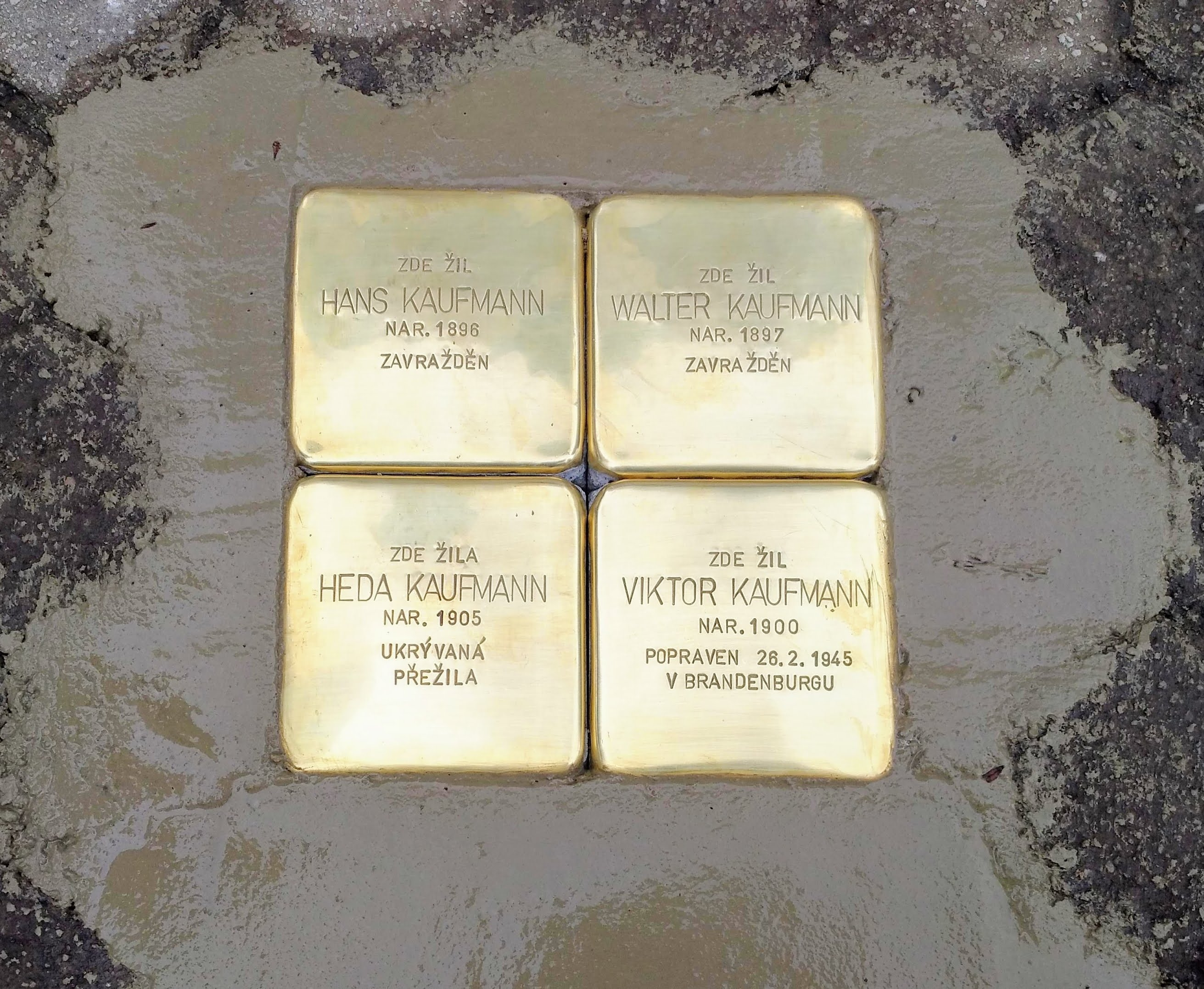 Čtyři Stolpersteine položené v Hejnicích v Lázeňské ulici před č.p. 381.